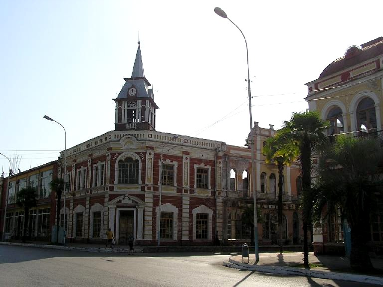 View of Gudauta, Abkhazia